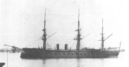 Fragata blindada Sagunto